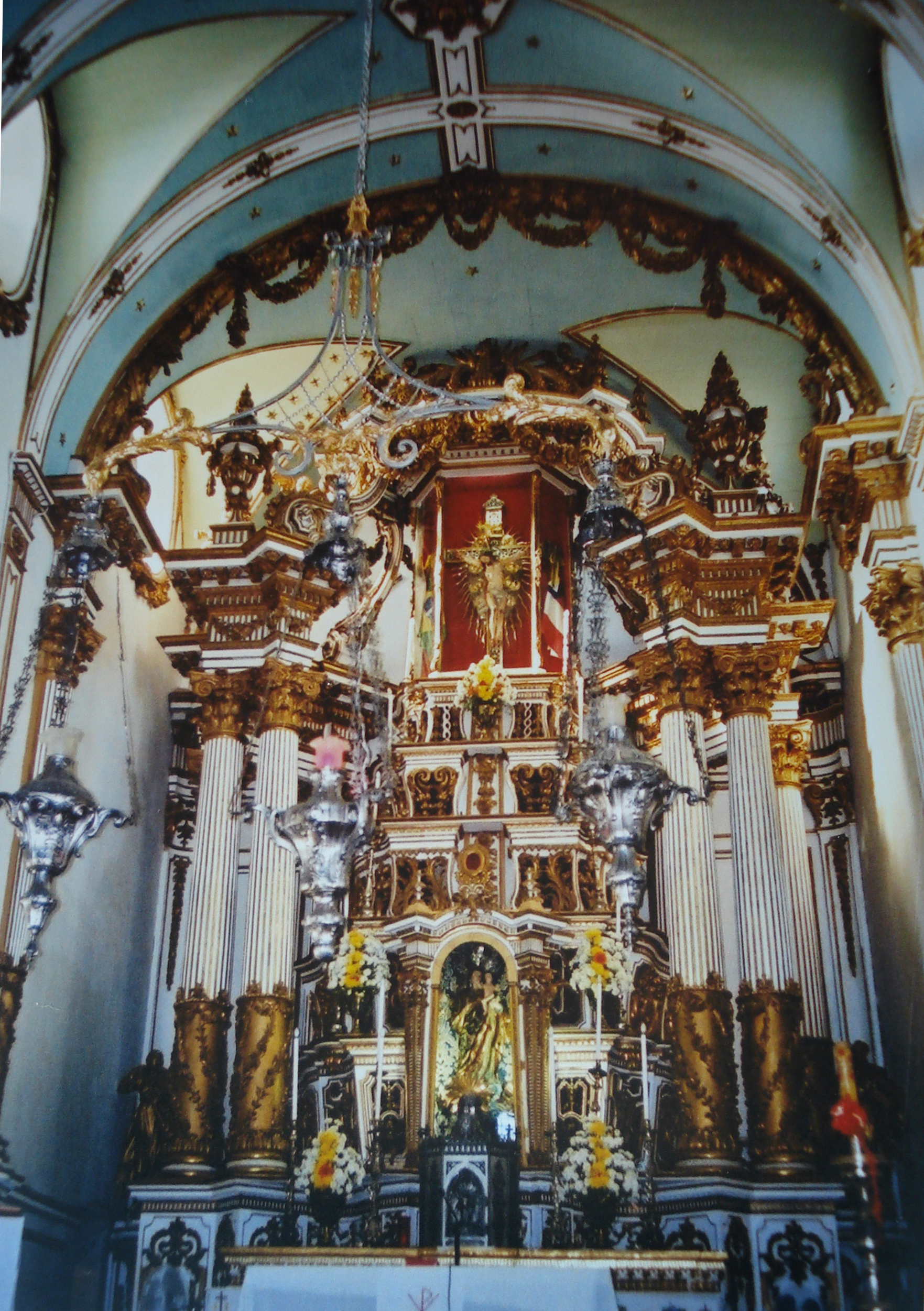 Altar-mkor da Igreja do Bonfim, Salvador, Brasil